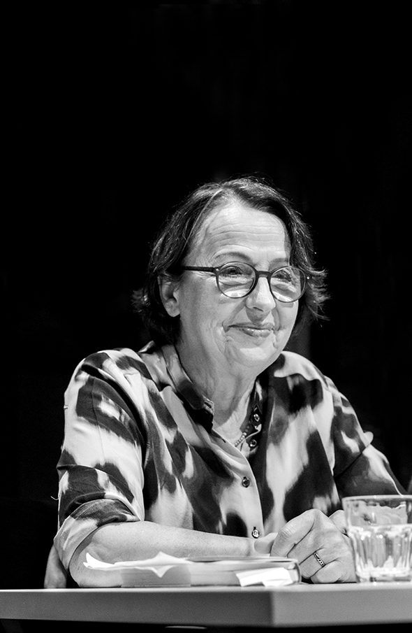 Am 06.09 2016 las im Literaturhaus Köln, Katja Lange-Müller aus ihrem Roman „Drehtür“